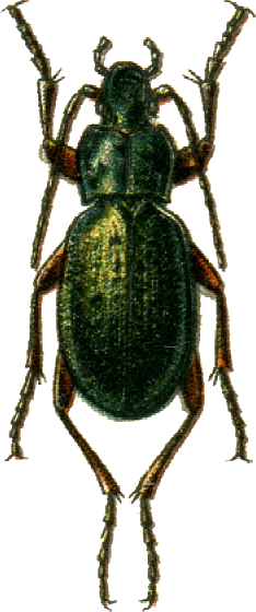 This file has been extracted from another file: Jacobs07.jpg